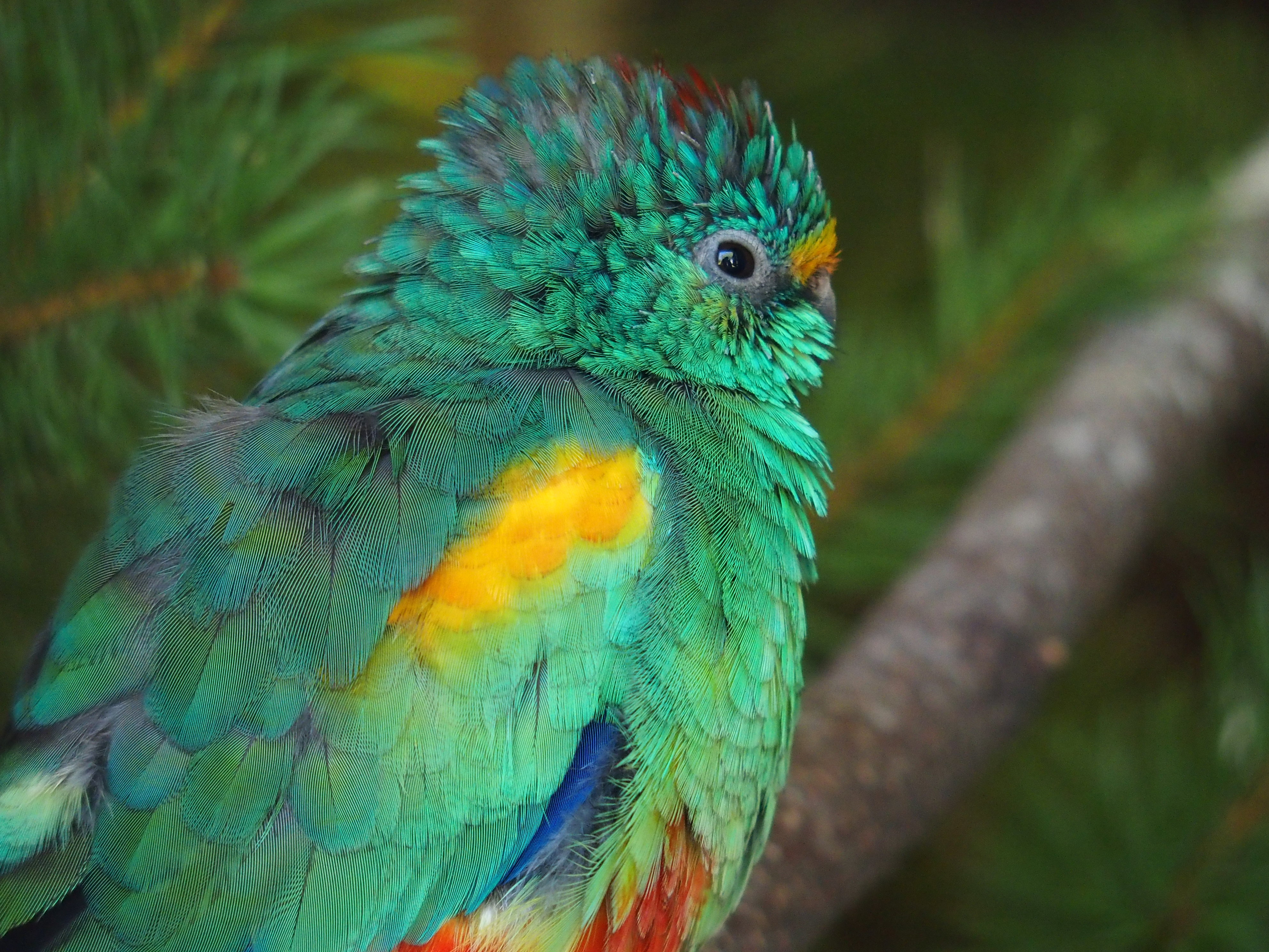 Detailaufnahme eines Vielfarbensittichs, Heinolan Lintutarha, Finnland